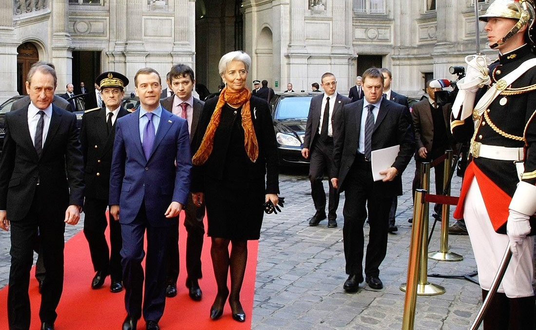 В ходе посещения мэрии Парижа. С мэром города Бертраном Деланоэ и Министром экономики и финансов Франции Кристин Лагард.